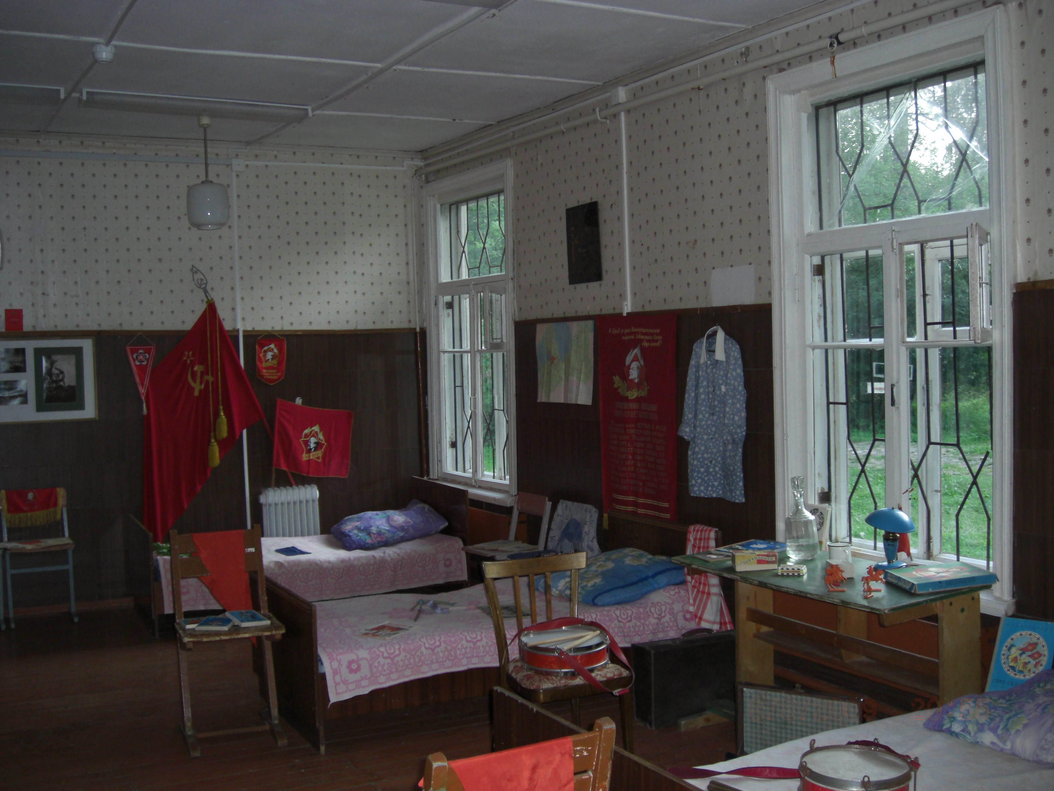 Быт пионерского лагеря в историко-бытовом музее "Дачная столица" в посёлке Сиверский Гатчинского района Ленинградской области